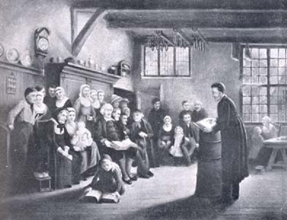 Conventikel, protestantse religieuze bijeenkomst buiten de kerk om. Midwolda ca. 1840